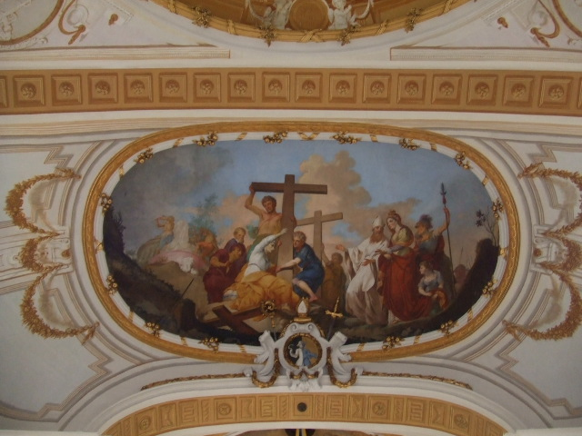 Breitenthal (Schwaben), Landkreis Günzburg: Pfarrkirche Heilig Kreuz Deckenfresko von Konrad Huber: Auffindung des hl. Kreuzes durch die hl. Helena, 1785/1786